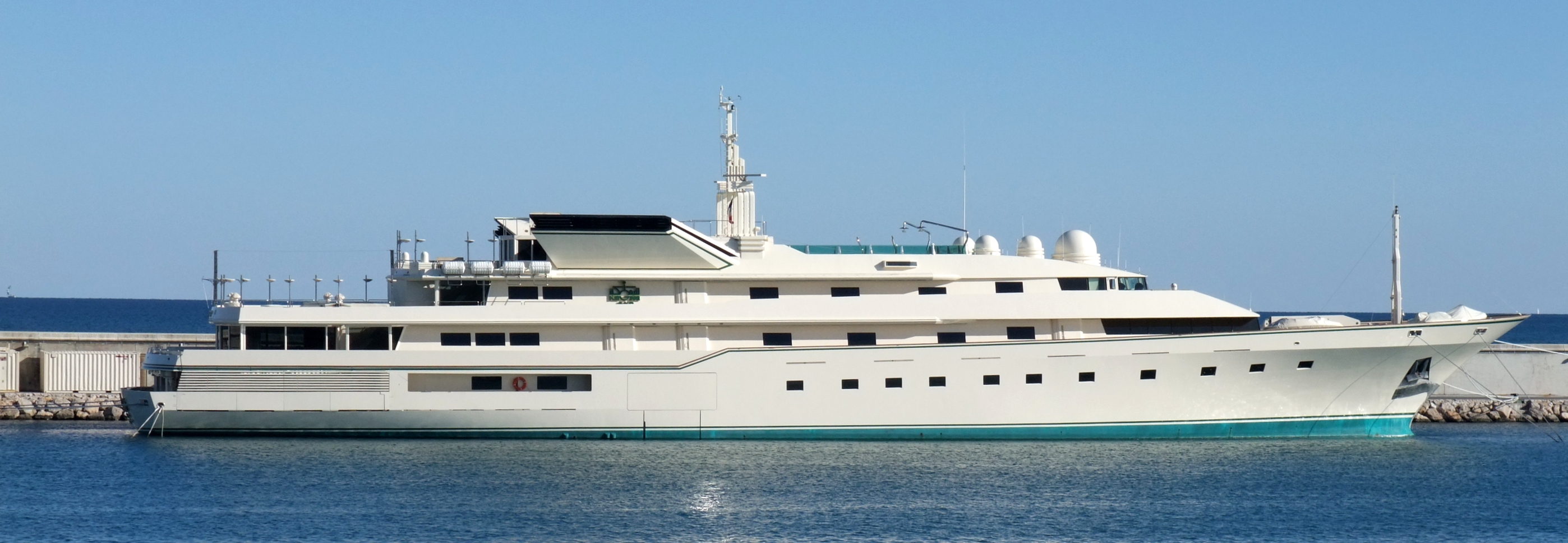 Vue d'ensemble du Kingdom 5KR. Lieu = port d'Antibes (France).